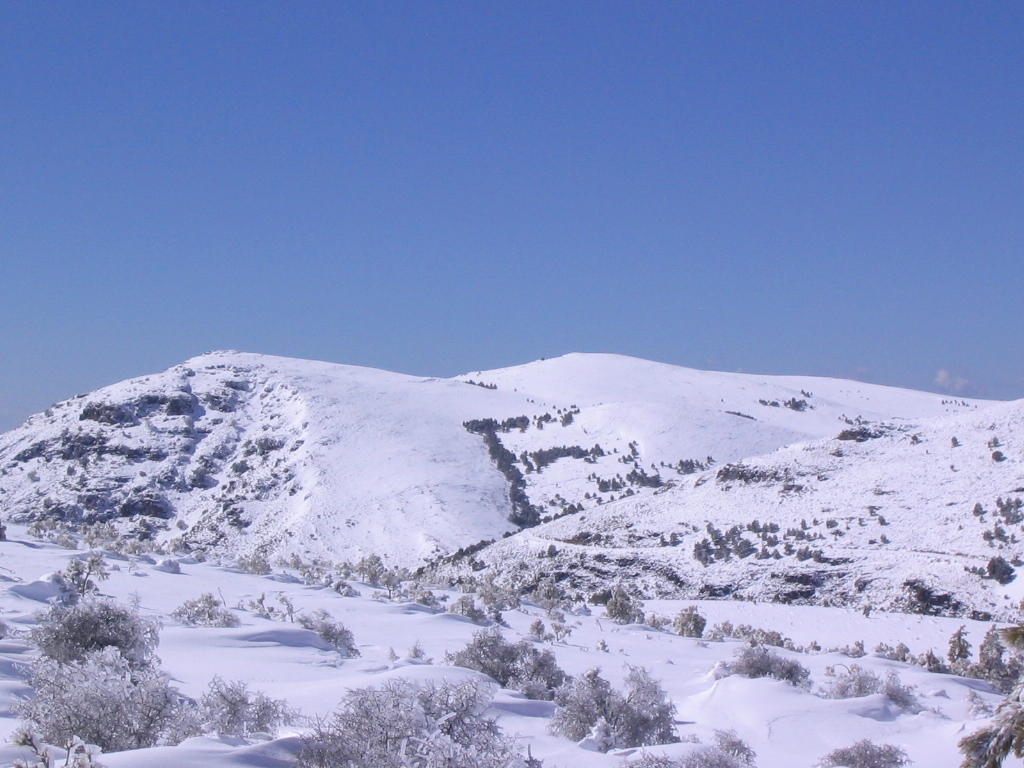 El Castillejo (también conocido como Chochete) visto desde su cara norte.